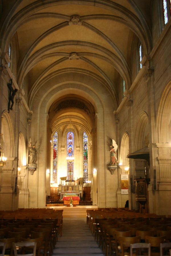 Eglise Saint Pierre Saint Paul - Rueil-Malmaison - intérieur